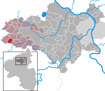 Münk in Rhineland-Palatinate - district Mayen-Koblenz